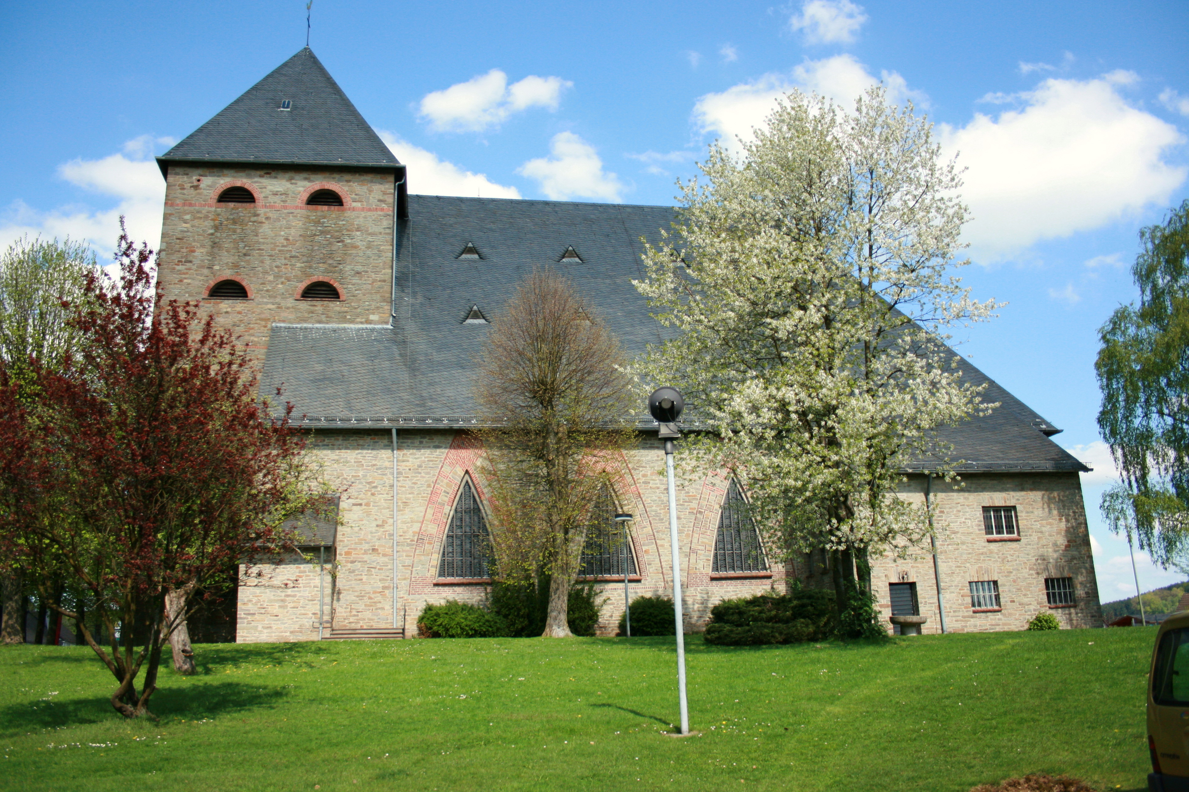 Sankt Apollinaris in Lindlar-Frielingsdorf